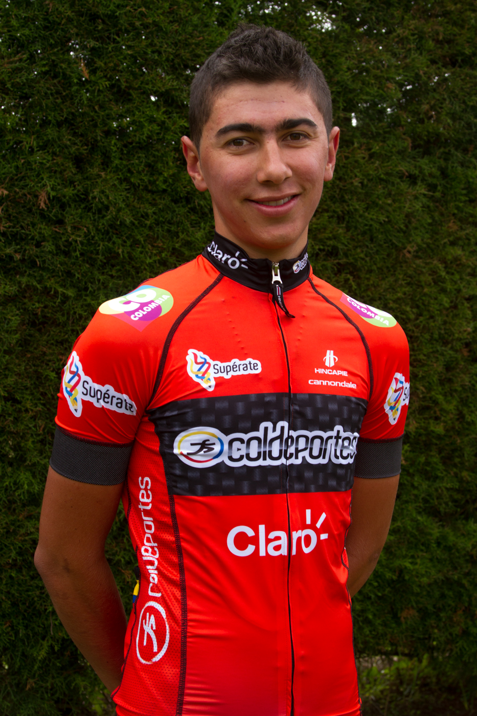 Sebastián Henao con el equipo coldeportes claro 2013